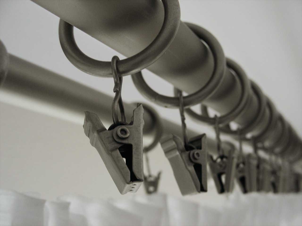 Metalowe klamerki służące do łączenia firany z karniszem